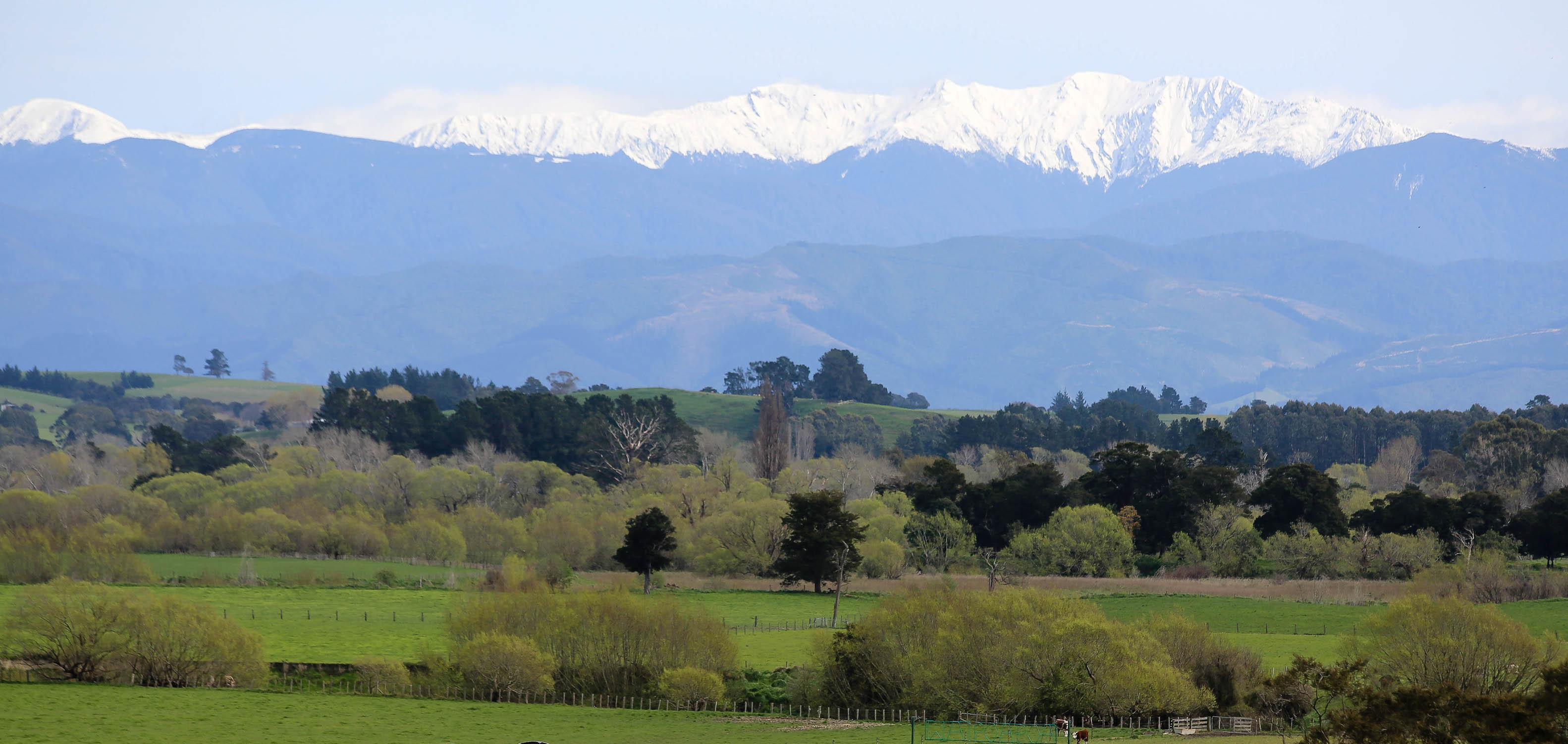 Tararuas from Wairarapa